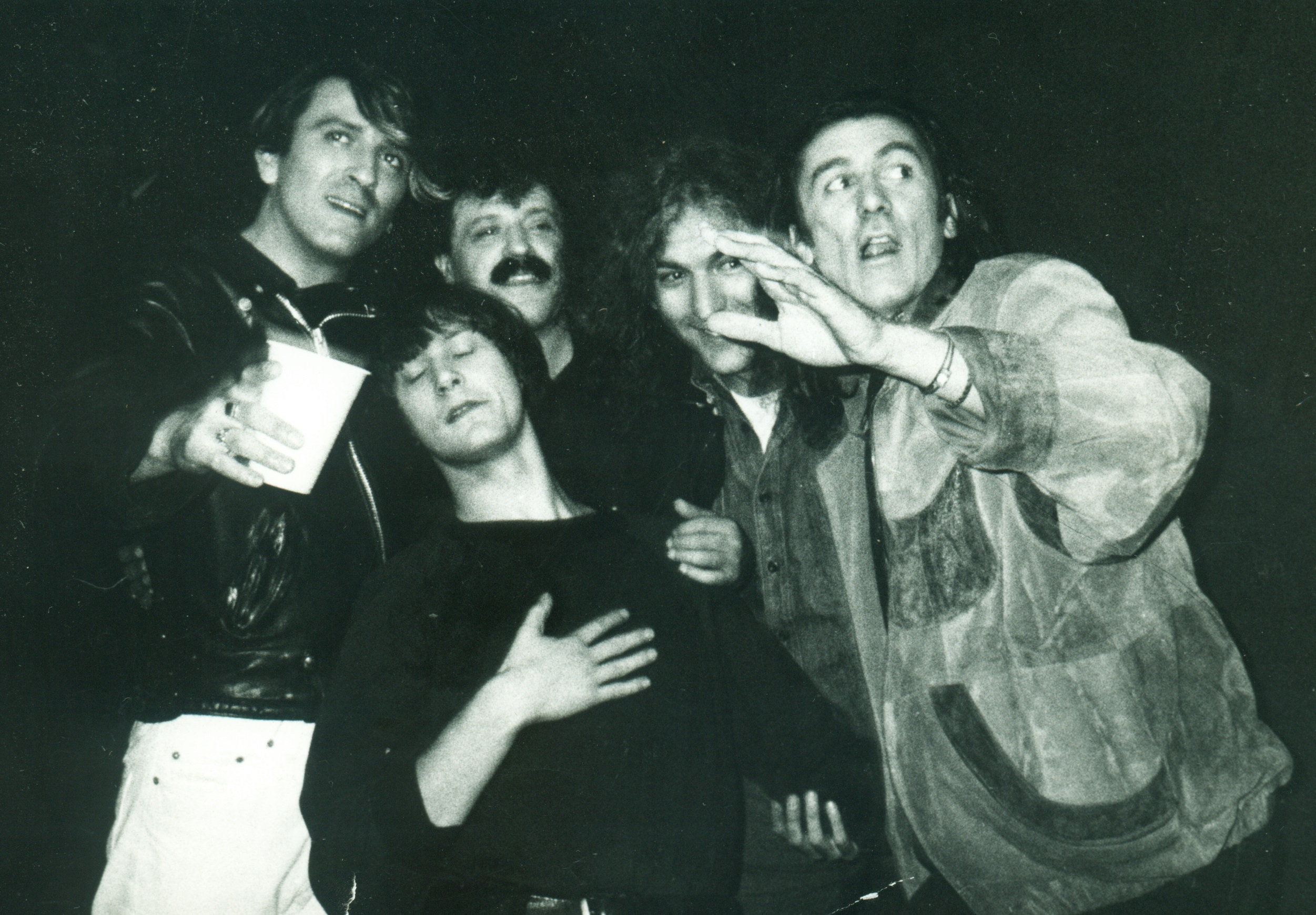 Ž.A.Čičak sa M.V.Tifom, B.Langerom,D.Gobcem i B.Đurićem - Đurom tokom YU rock maratona u sarajevskoj Zetri 1989. godine.